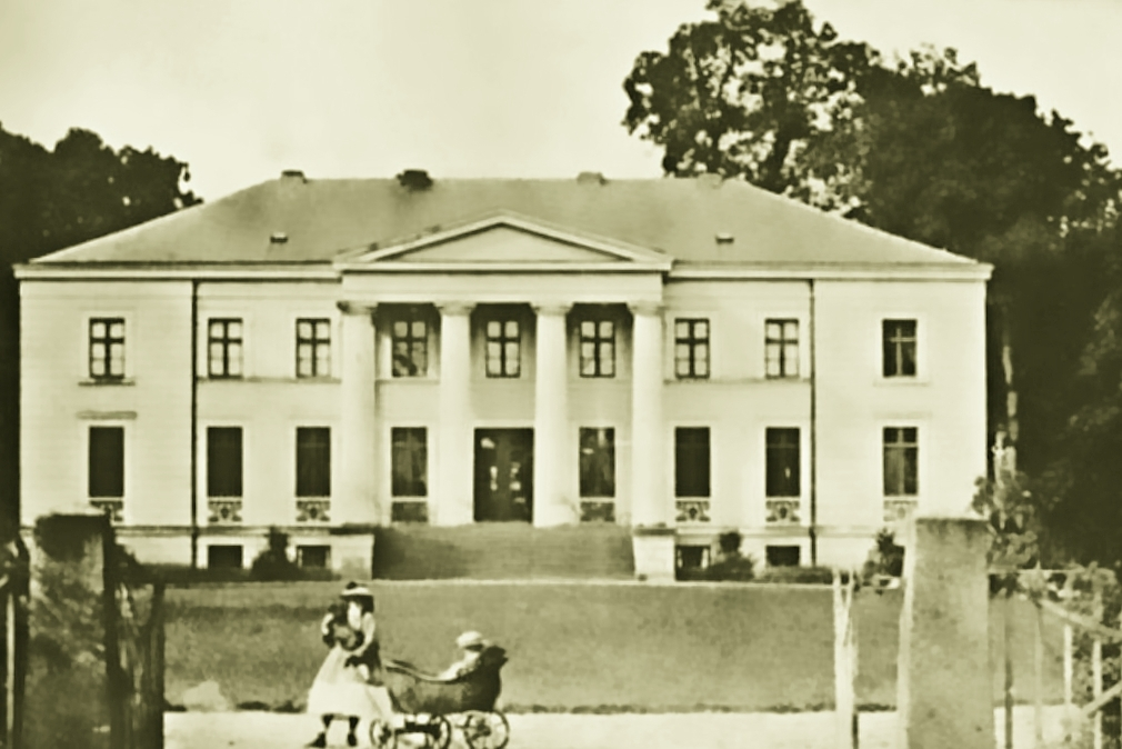 Herrenhaus Melkhof